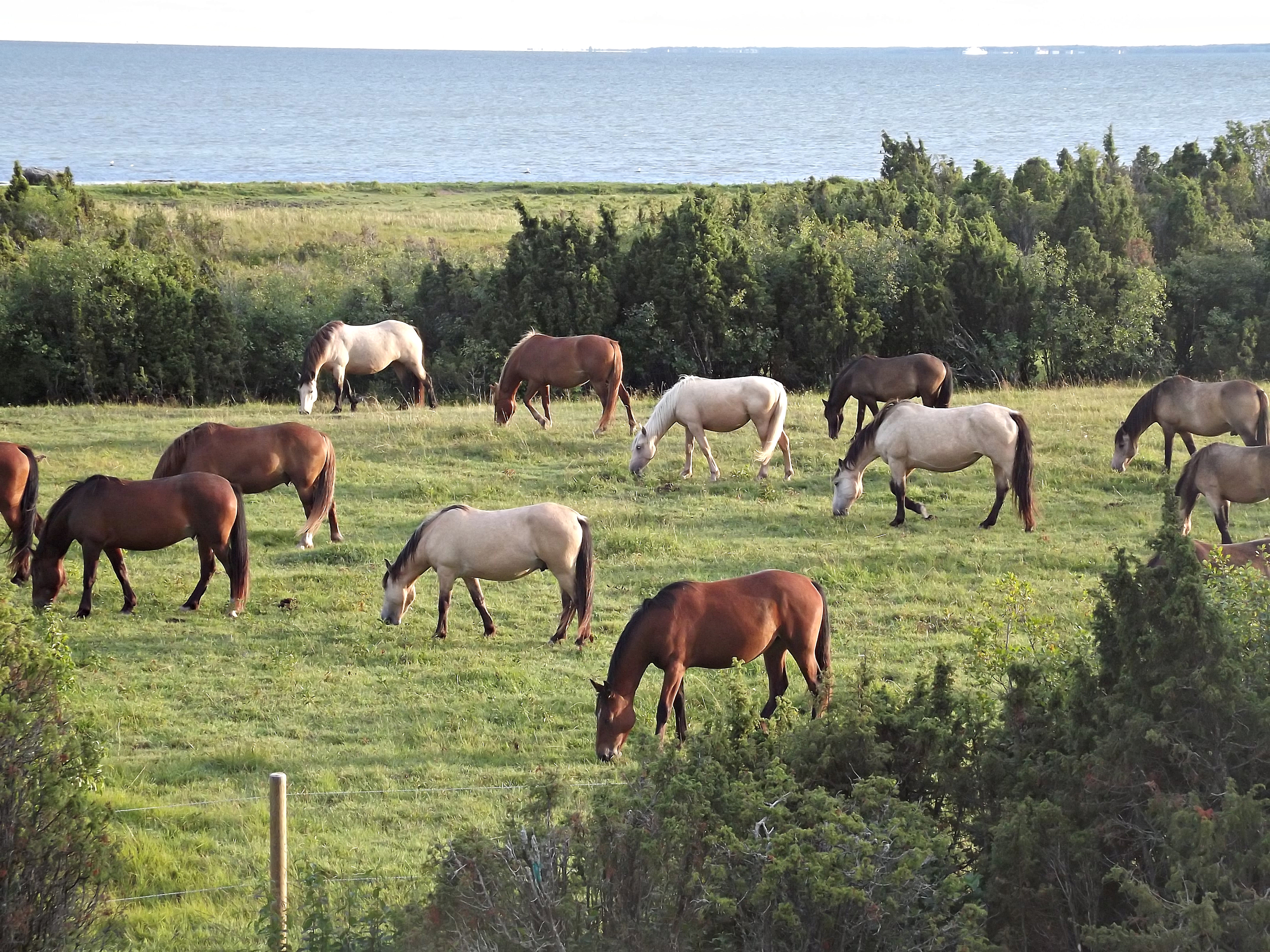 Ranna Rantšo hobused